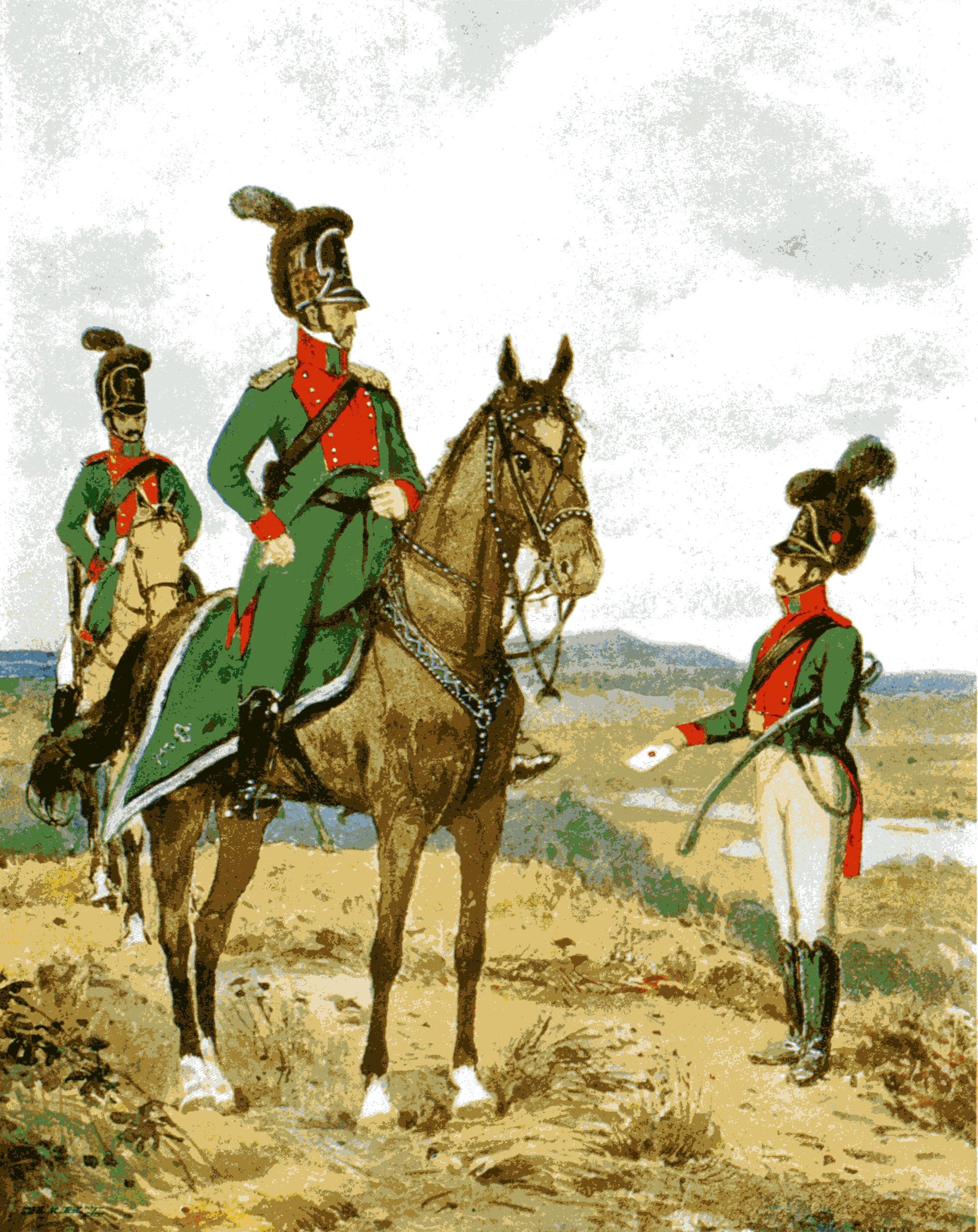 Hessische Landdragoner zu Pferd und zu Fuß 1804. Uniform nach Art der hessischen Chevaulegers, grün und ponceaurot, Raupenhelm mit Roßschweif und Federbusch